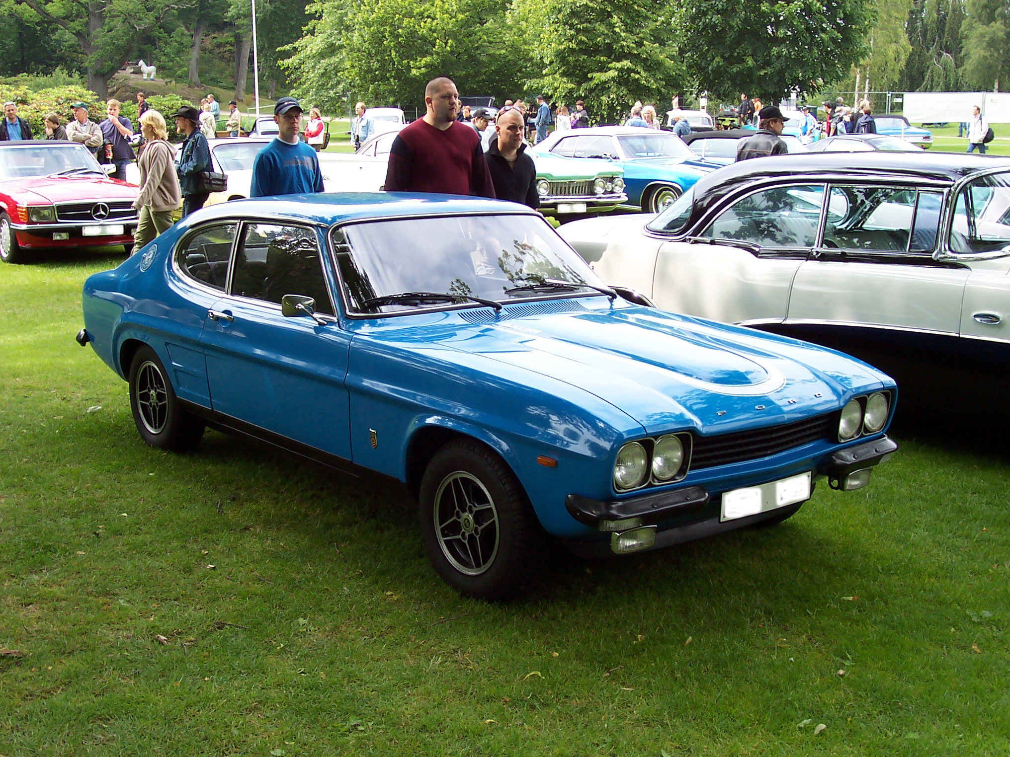 Форд Капри (1969-1974 г.).